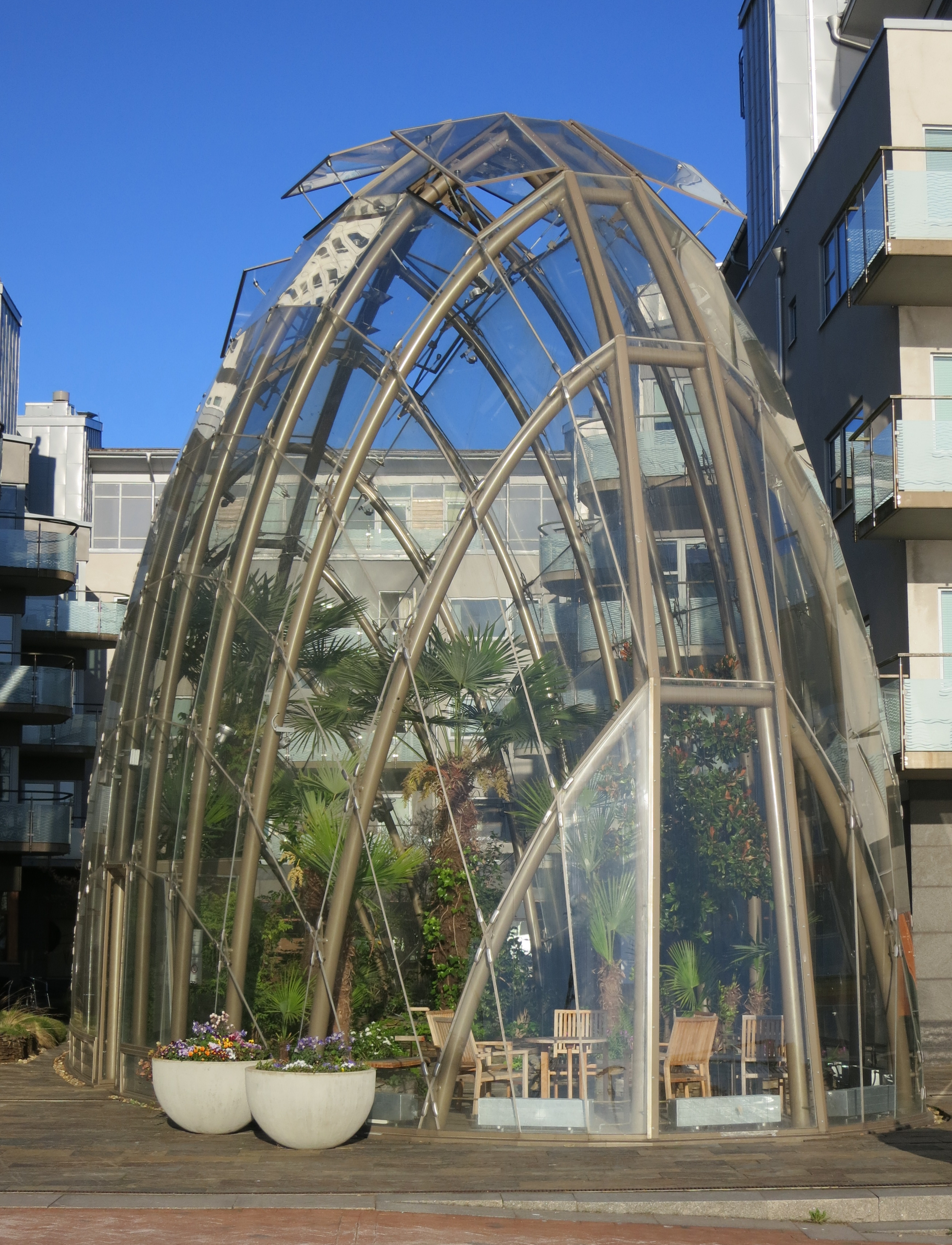 Glasbubblan av Monica Gora i Västra Hamnen i Malmö